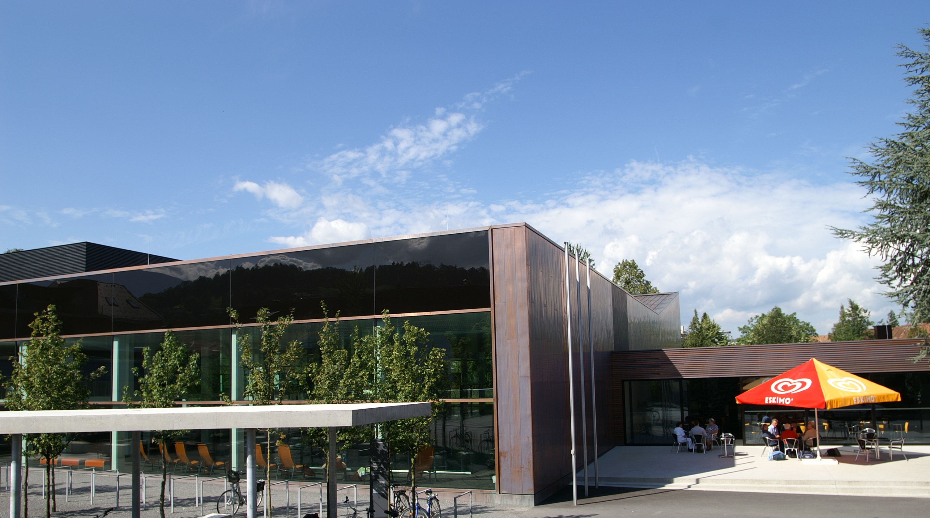 das Stadt Bad in der Schillerstrasse Nr. 18 in Dornbirn, Vorarlberg. Nach Plänen von cukrowicz nachbaur architekten zt gmbh.